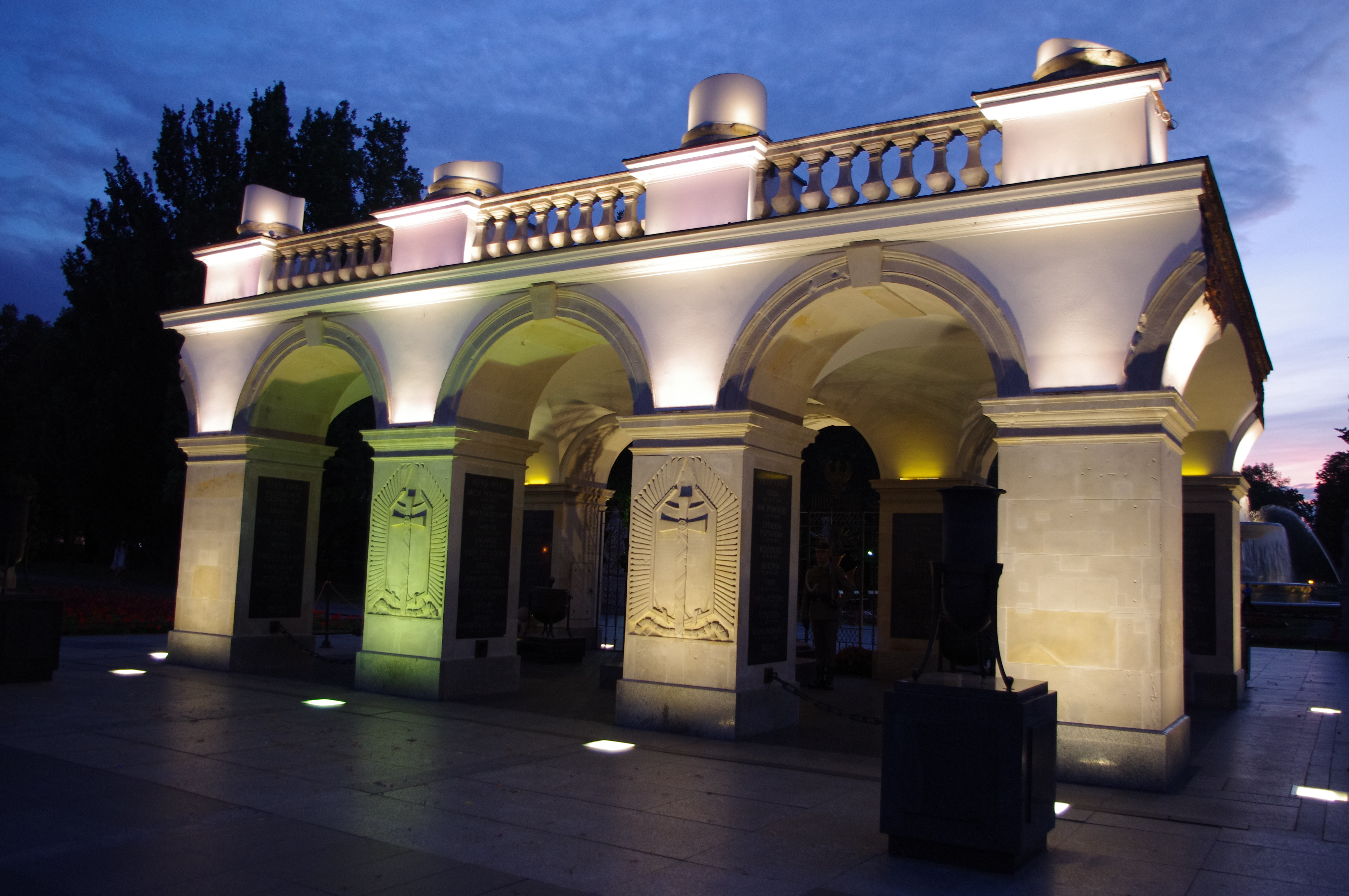 Grób Nieznanego Żołnierza w Warszawie